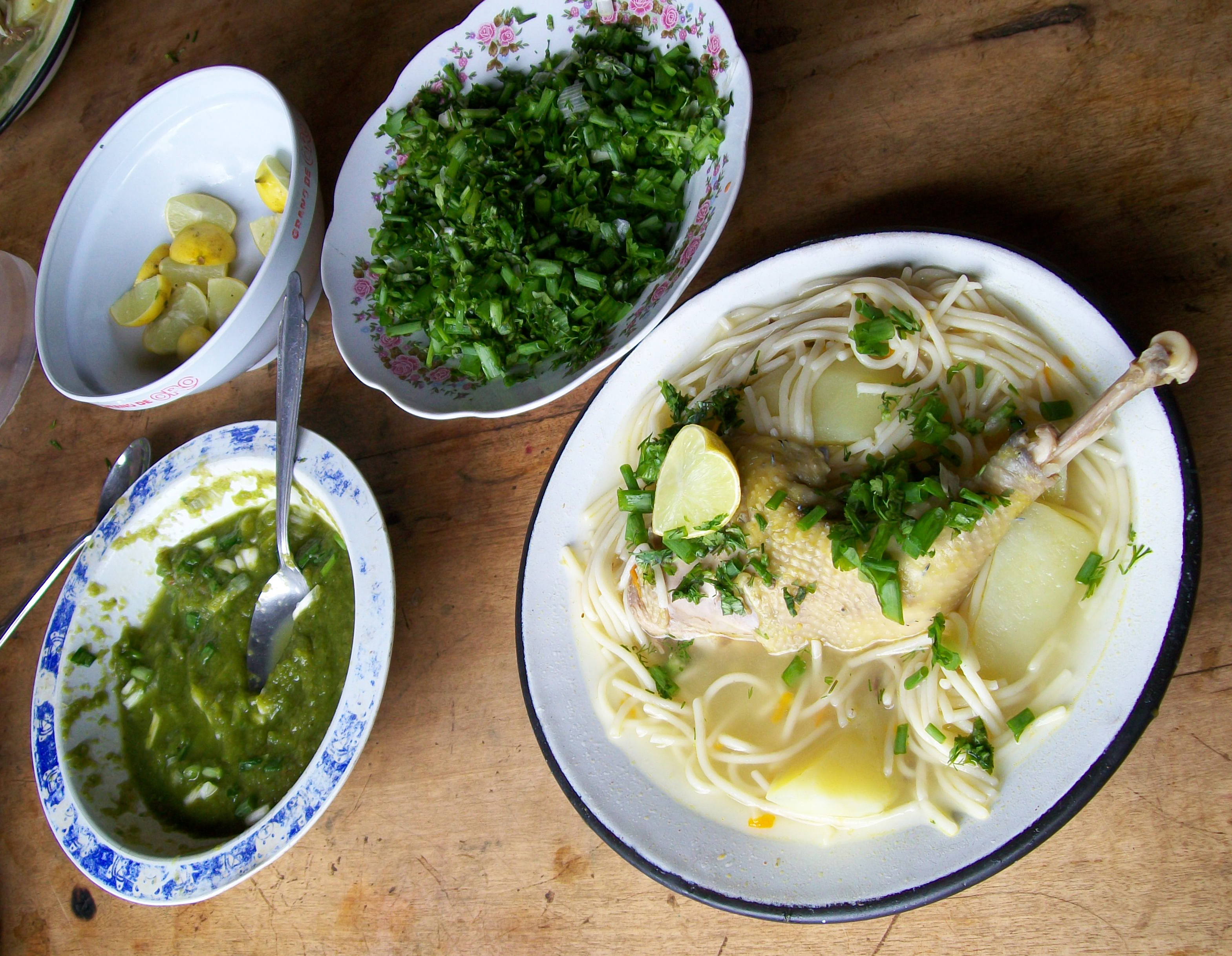 Gastronomía de Ocros Nombre: Caldo de gallina País : Perú Fotógrafo:© Edgar Amador espinoza Montesinos